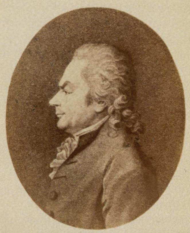 On trouve ce portrait dans : Les Alsaciens illustres : portraits en photographie avec notices biographiques par M. Ch. Winter, photogr., Strasbourg , C.F. Schmidt, 1864, pl. 22. Coll. BNUS